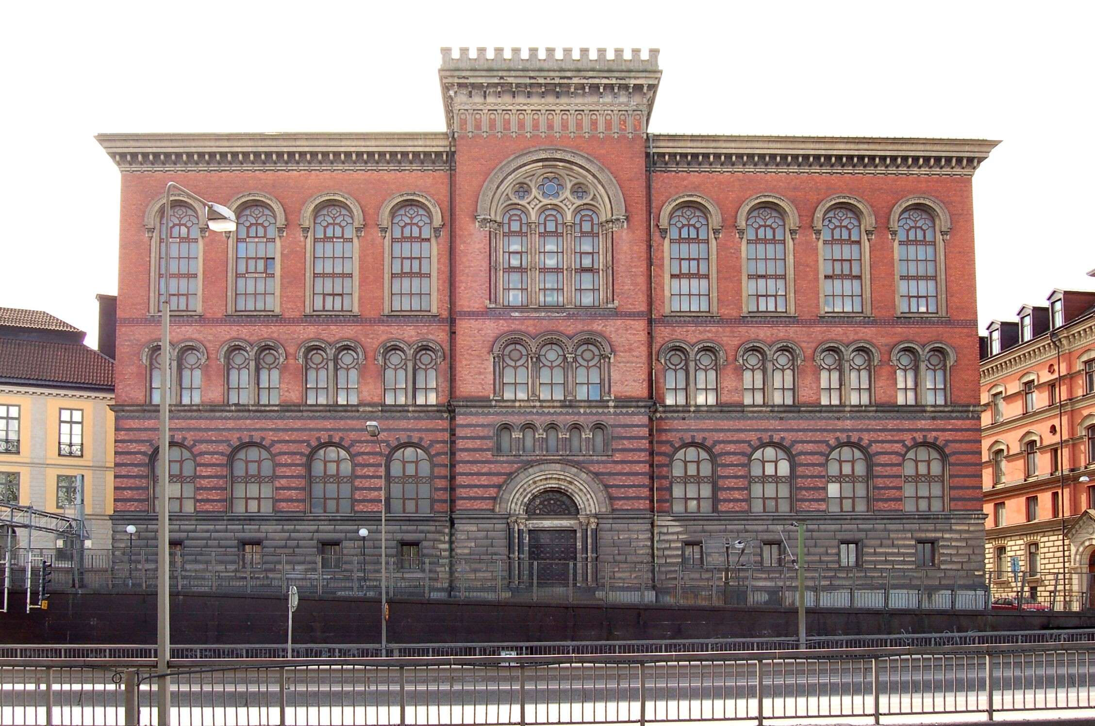 Gamla Rikarkivet på Riddarholmen i Stockholm.